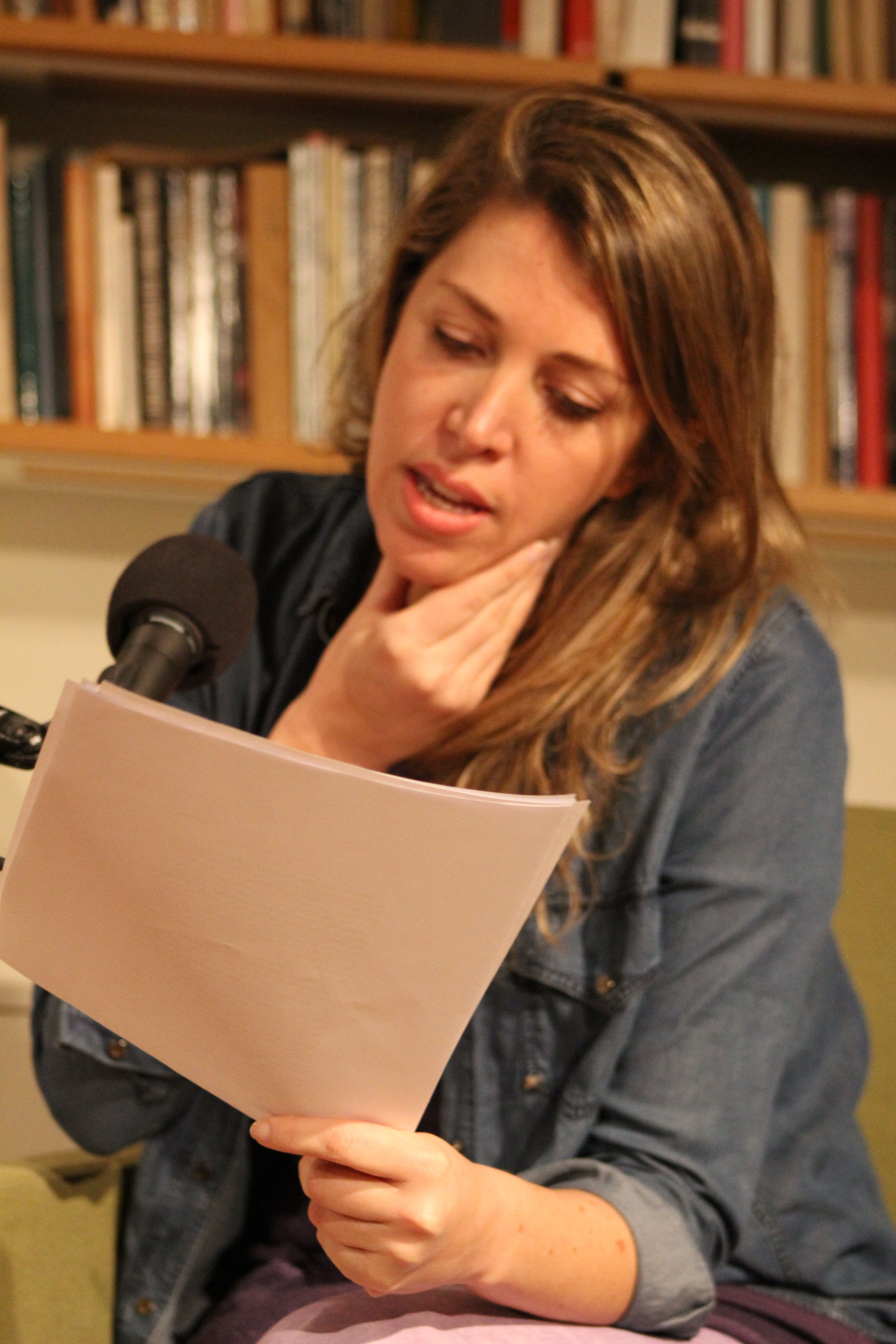 Escritora del libro "Wakolda" hizo lanzamiento de su publicación en Oslo, Noruega en octubre del 2013